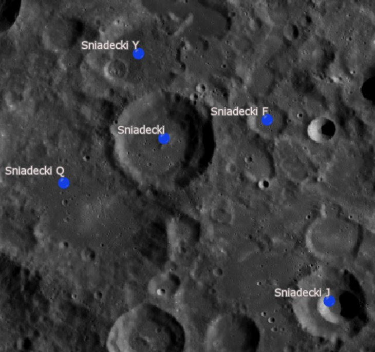 Cráter lunar Sniadecki. Cráteres satélite. (Imagen LRO)